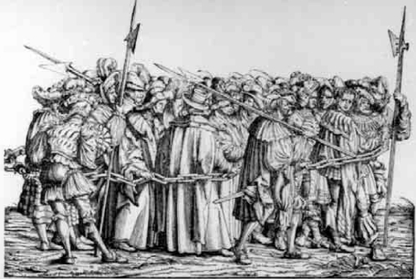 Gravure de Jost Amman. Titre : Capitaine. Date: 1568